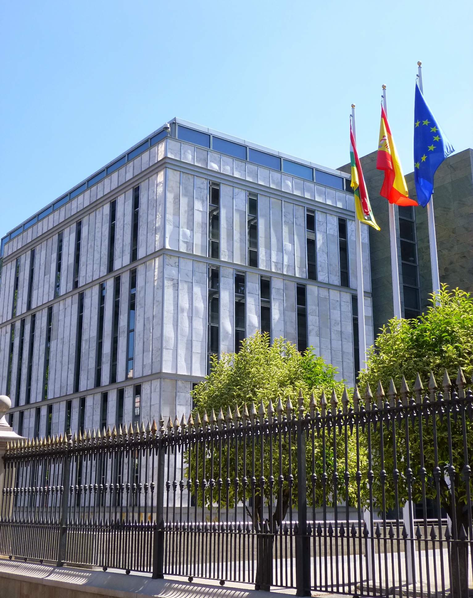 Gobierno de La Rioja, en Logroño